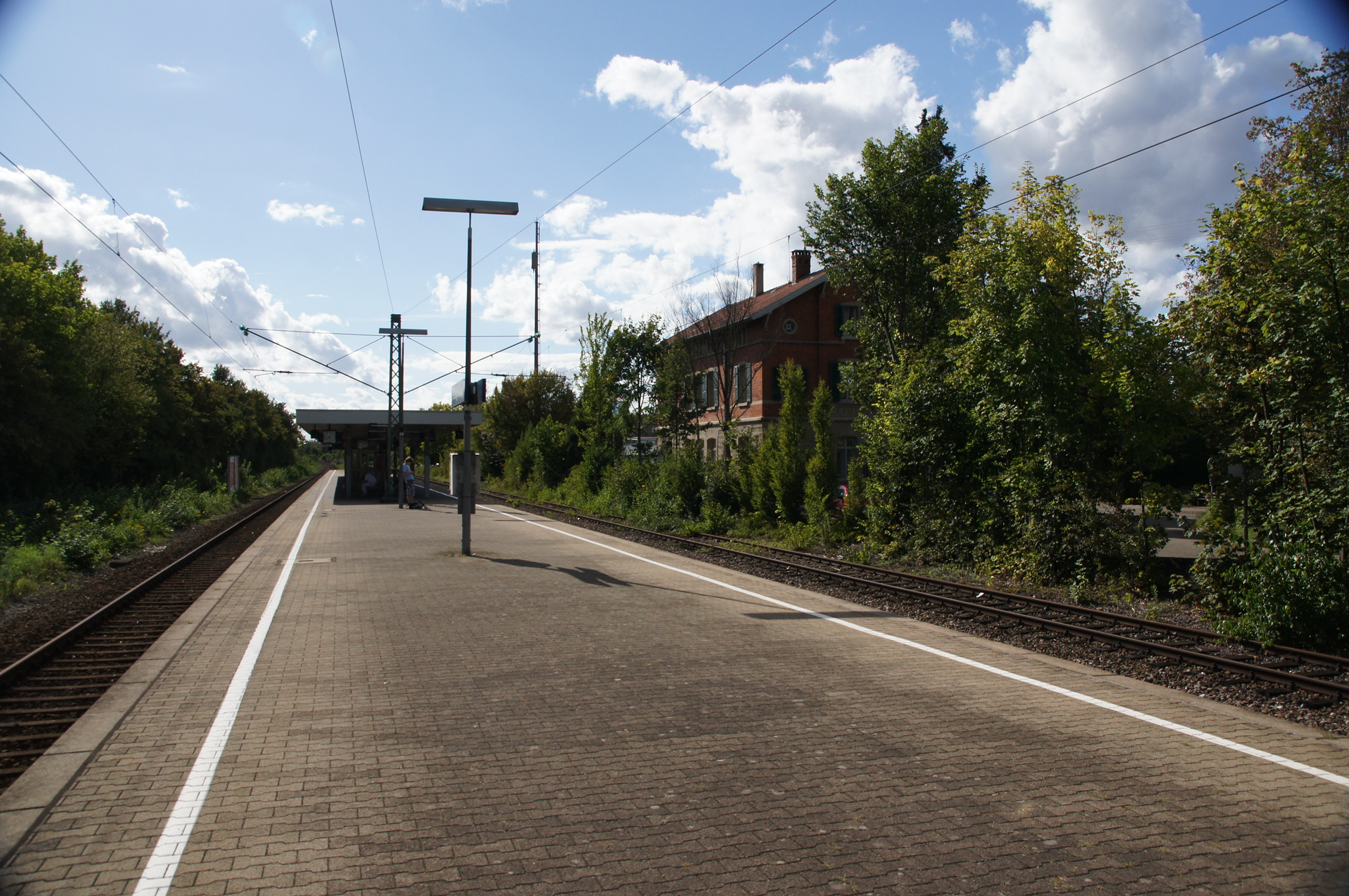 Bahnhof Freiberg (Neckar)